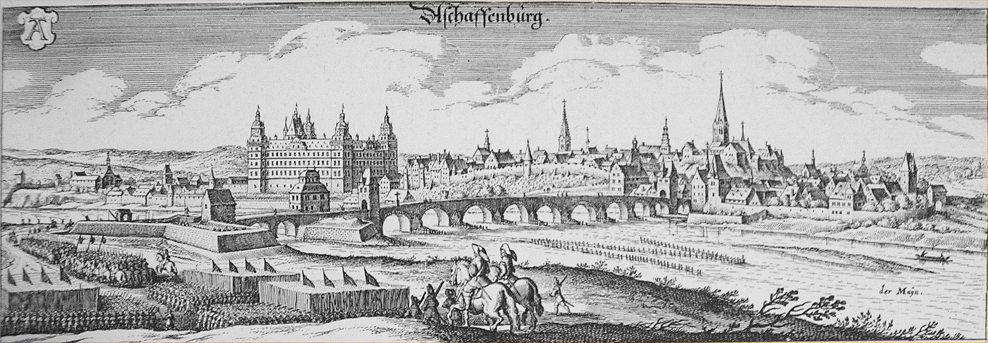 Aschaffenburg